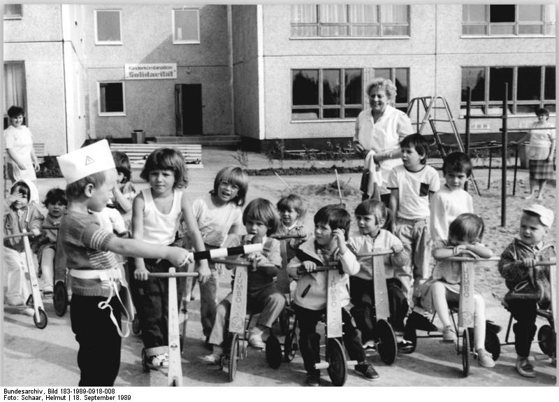 Völkershausen, Kindergartenkinder beim Spielen ADN-ZB Schaar 18.9.89 Bez. Suhl: Verkehrsunterricht ist eines der liebsten Spiele der Kleinen von Völkershausen. In und um ihre neue Kinderkombination haben sie die besten Voraussetzungen dazu. Errichtet wurde das Gebäude in nur fünf Monaten. Die finanziellen Mittel kamen aus dem Solidaritätsfonds des FDGB. Der Neubau der Kindereinrichtungen war durch die schweren Zerstörungen und Beschädigungen, die vom Gebirgsschlag verursacht wurden, notwendig geworden.